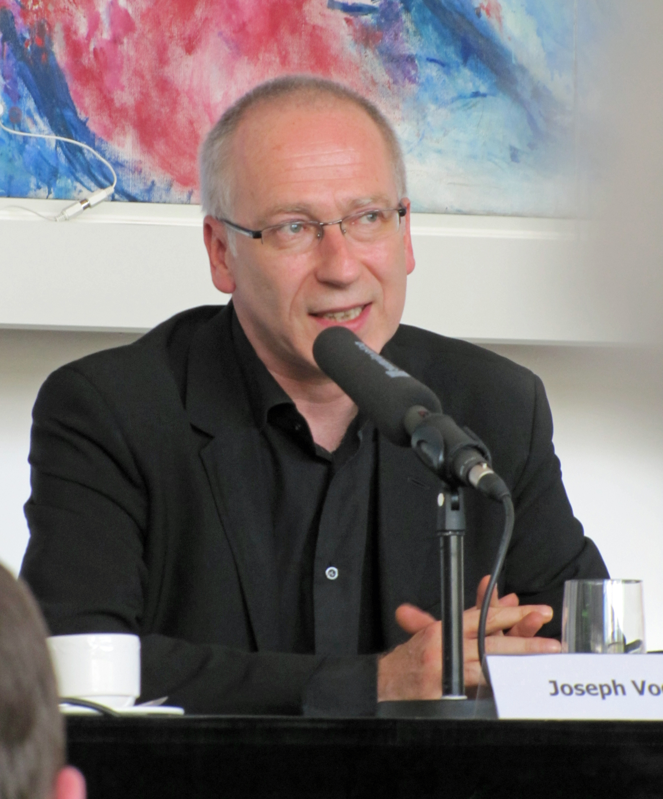 Joseph Vogl, 2012 bei den Roemerberggespraechen in Ffm.